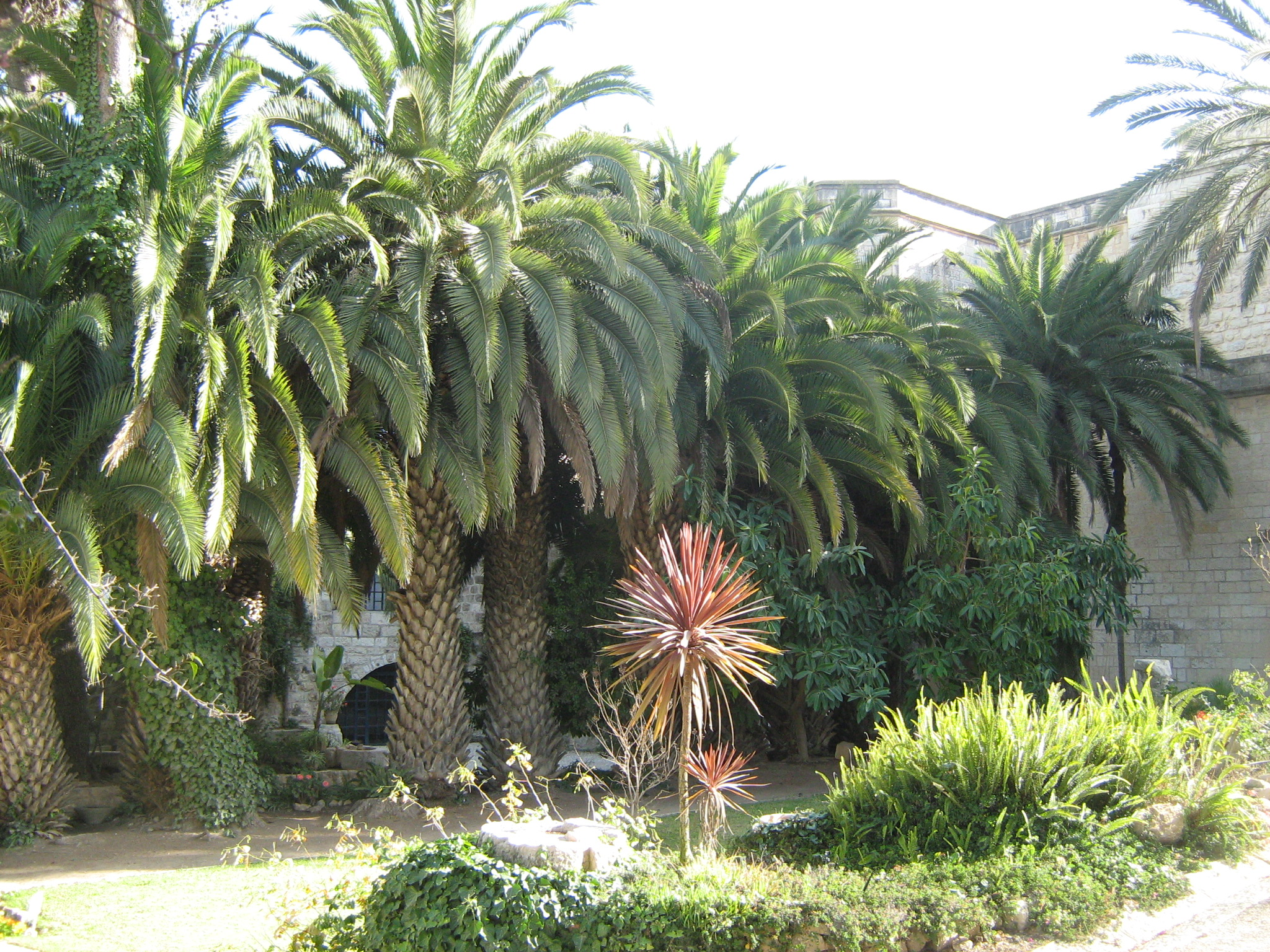 המנזר הבנדיקטיני באבו גוש